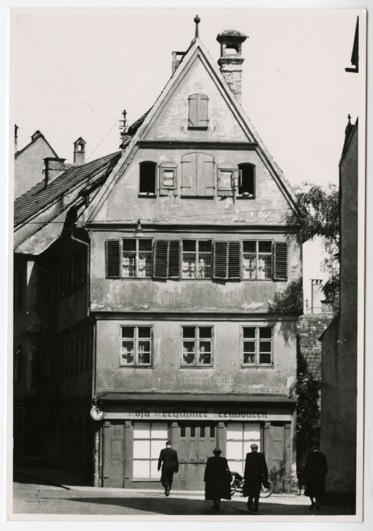 Das ehemalige Wachterhaus in der Ulmer Straße in Memmingen. Aufnahme von 1957.